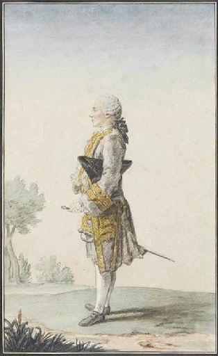 Portrait de Pidansat de Mairobert